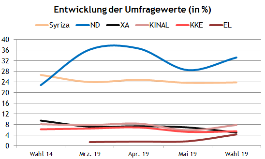 Europawahl 2019 Umfragen Griechenland